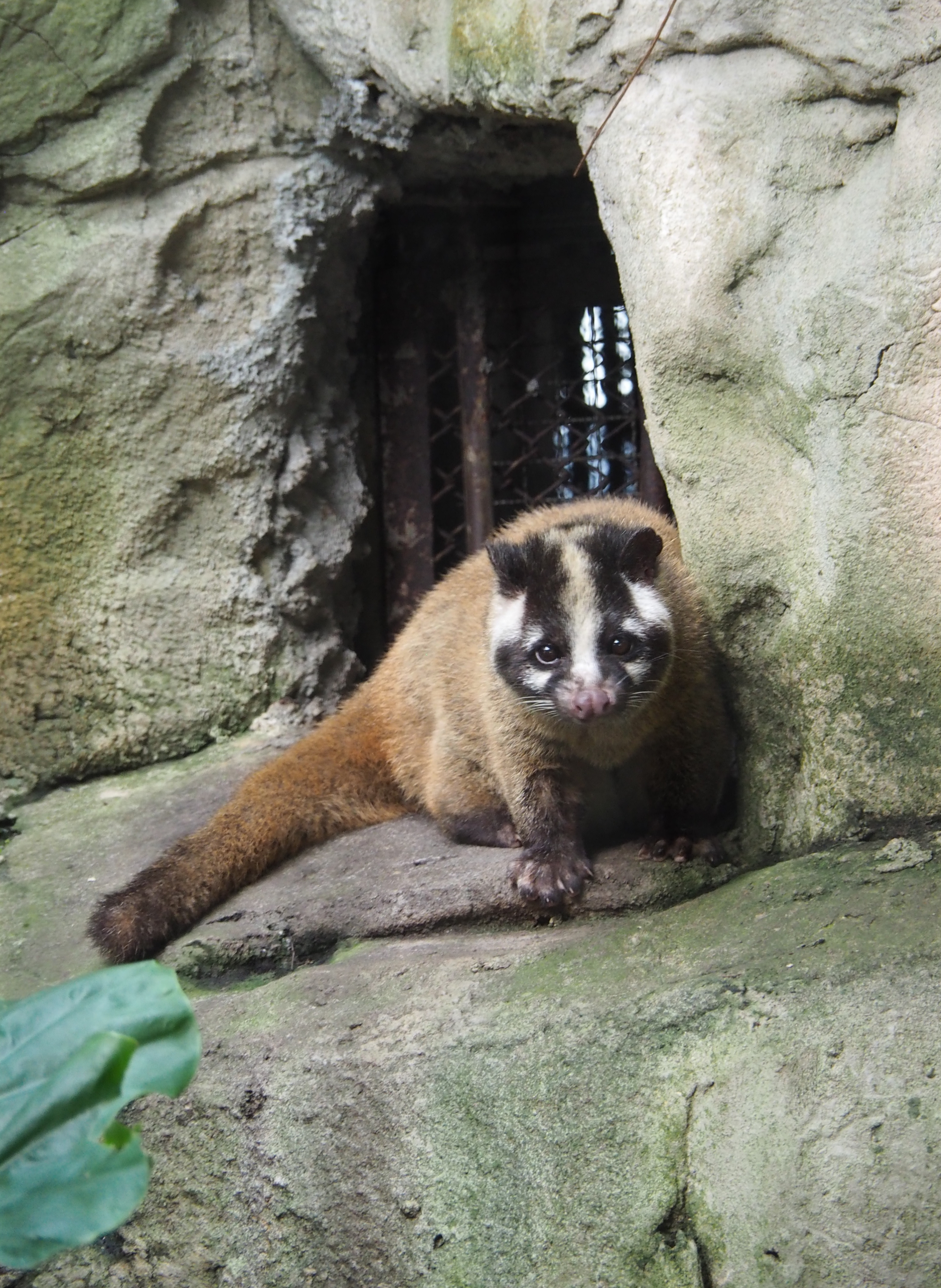 Taipei Zoo